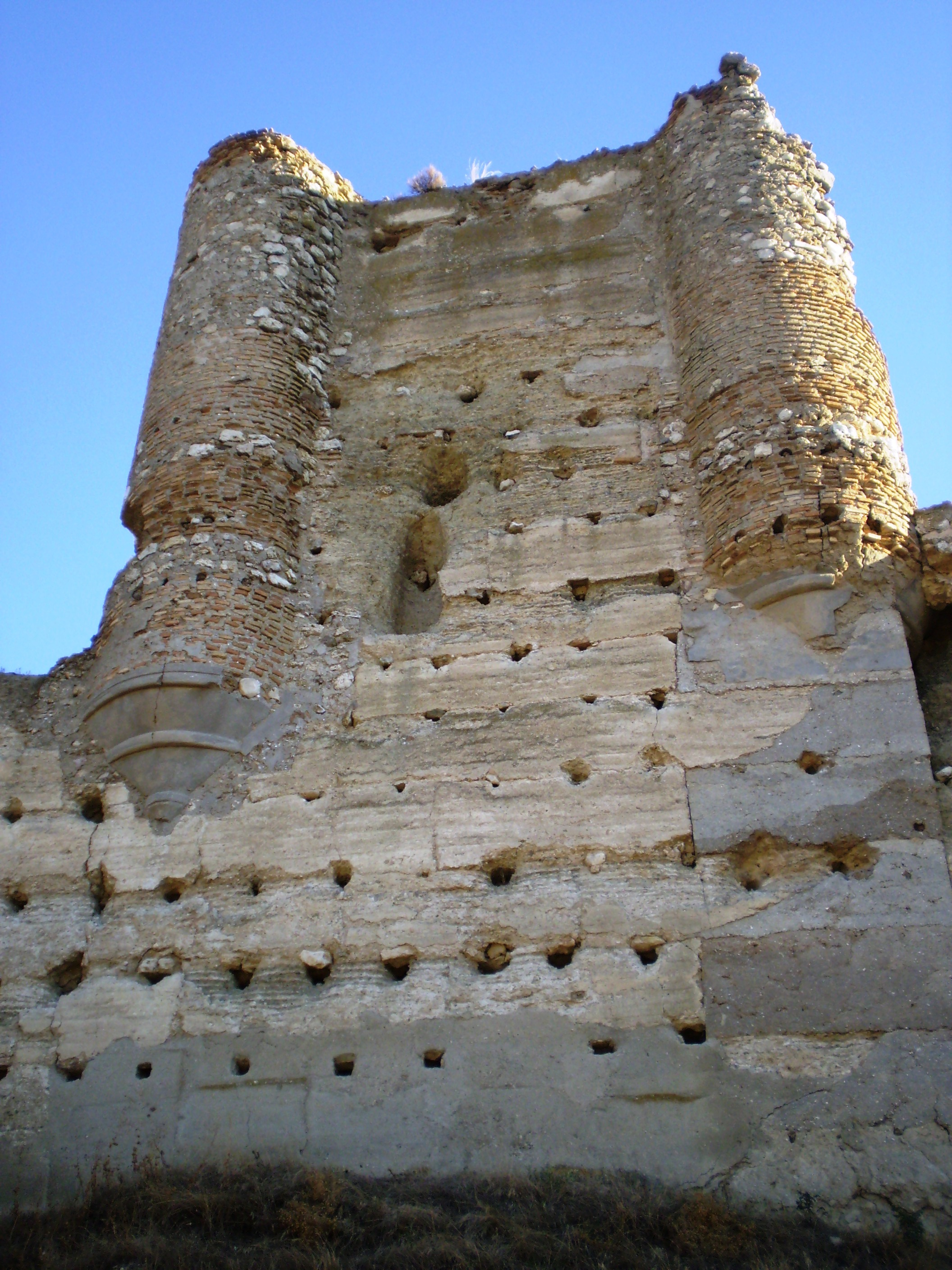 Fuentidueña de Tajo castle, Community of Madrid, Spain